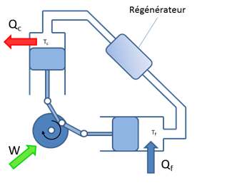 SCHEMA DE PRINCIPE D'UN REFRIGERATEUR STIRLING DE TYPE ALPHA